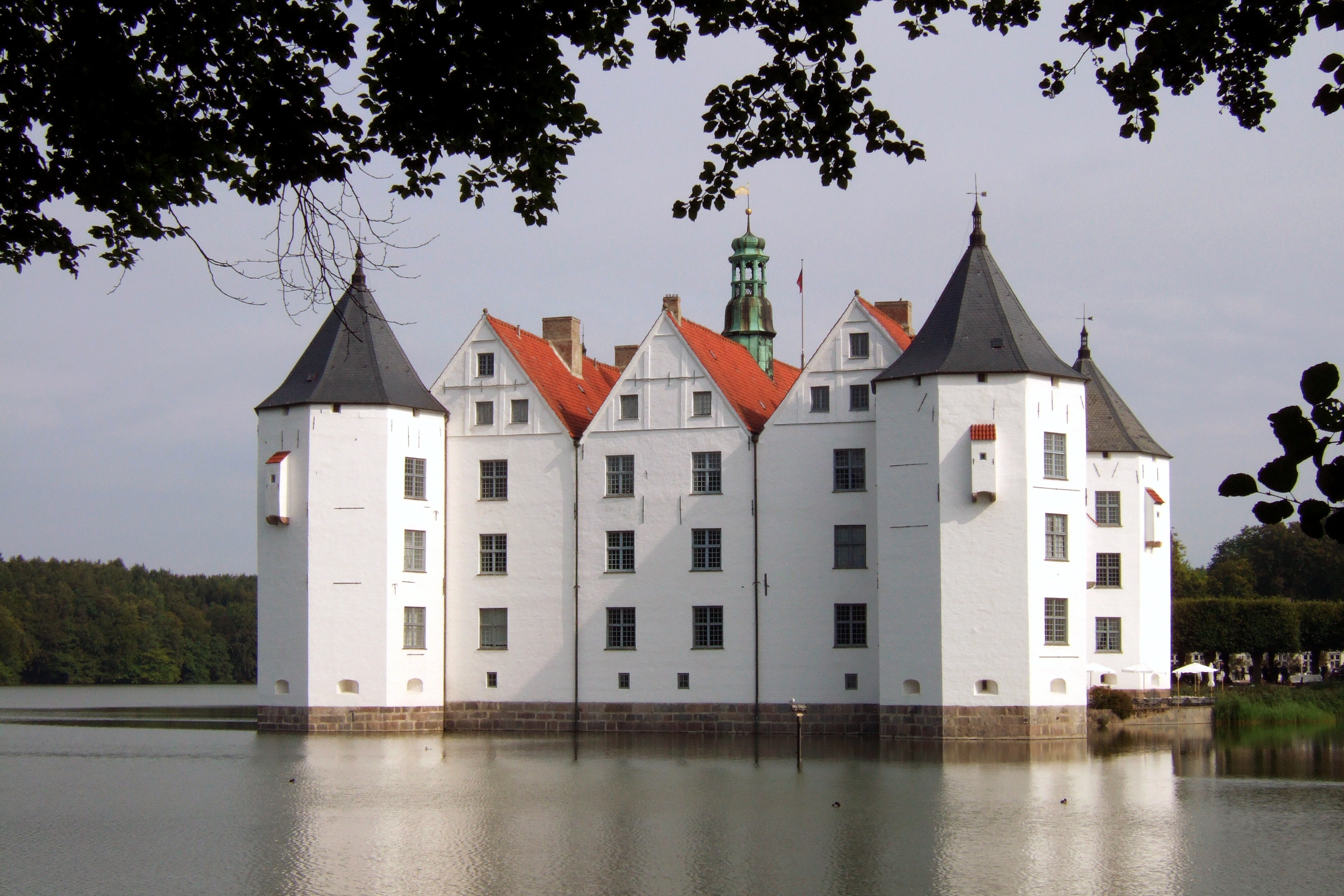 Wasserschloss Glücksburg